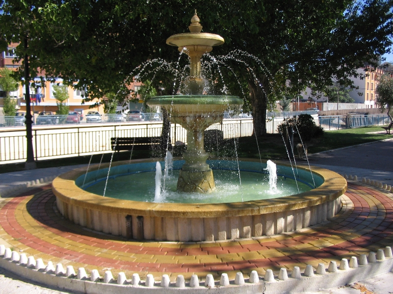 Fuente en el Paseo de Versalles